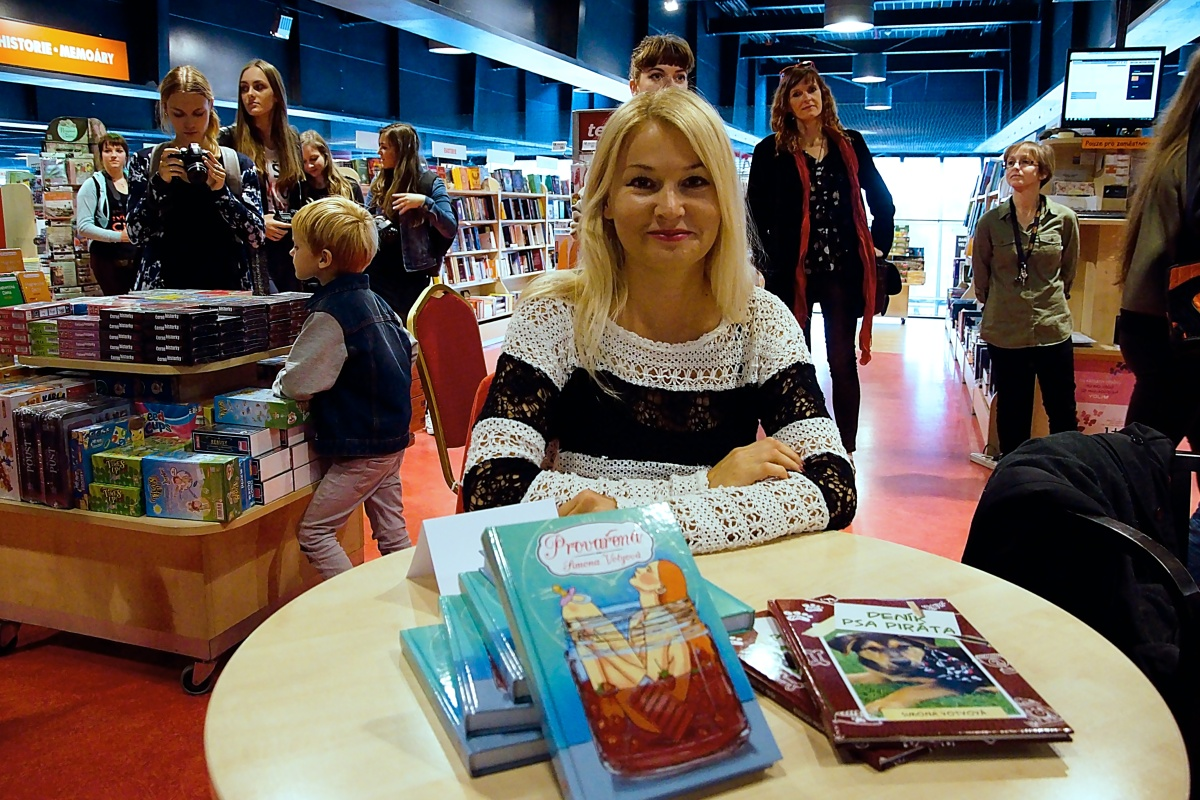 Simona Votyová